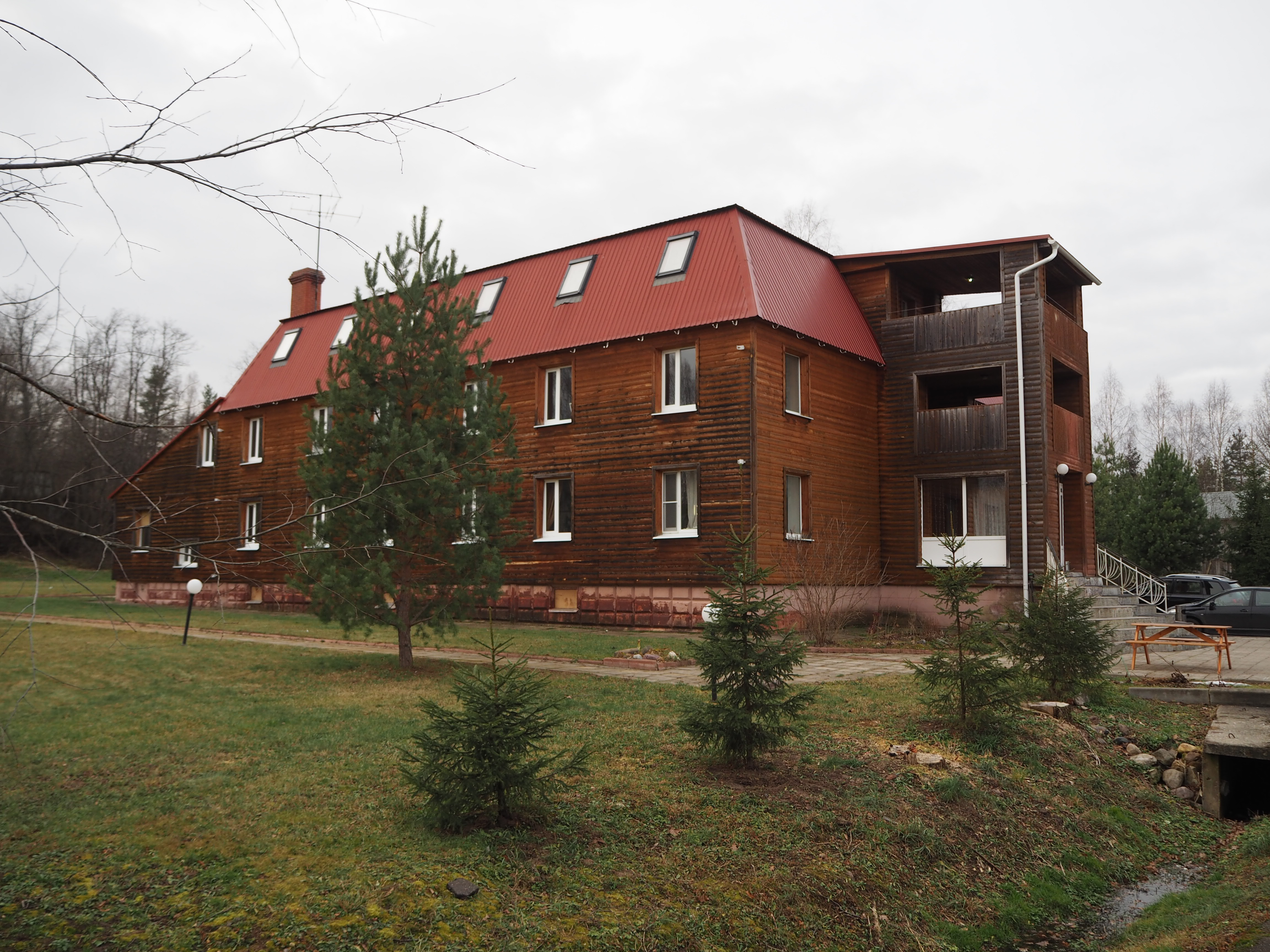 Пансионат "Вербилки" в селе Новоникольское Талдомского района Московской области.